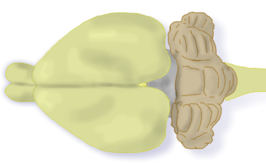 Representação esquemática do lisencéfalo de um coelho